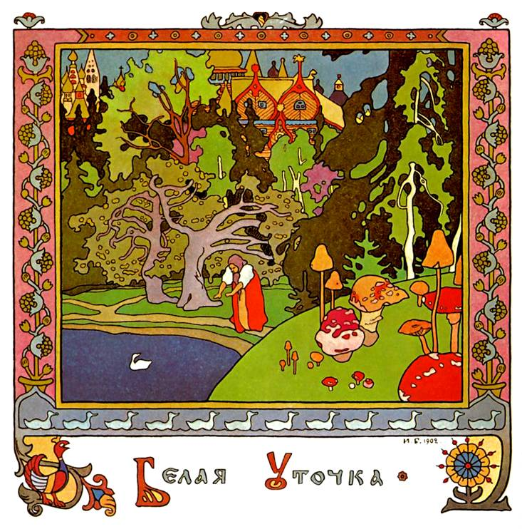 Заставка к сказке «Белая уточка»